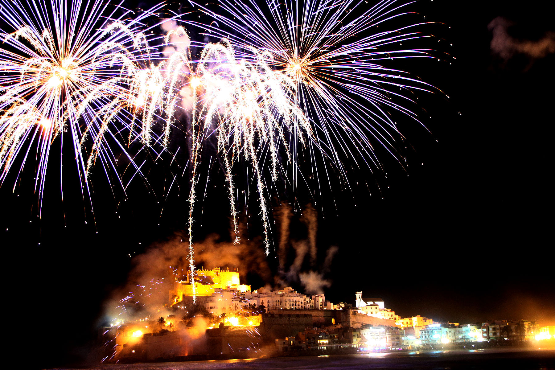 Peñíscola en festes